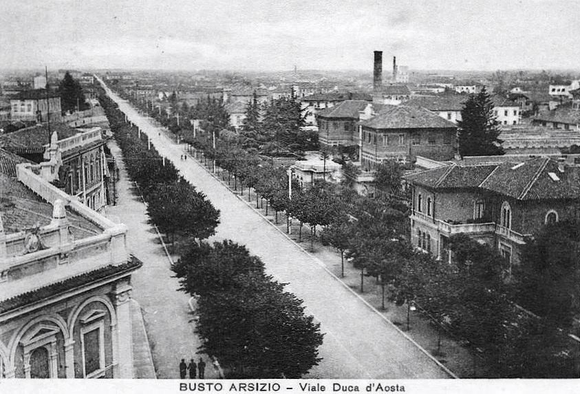 Il Viale Duca d'Aosta a Busto Arsizio negli anni 1940.